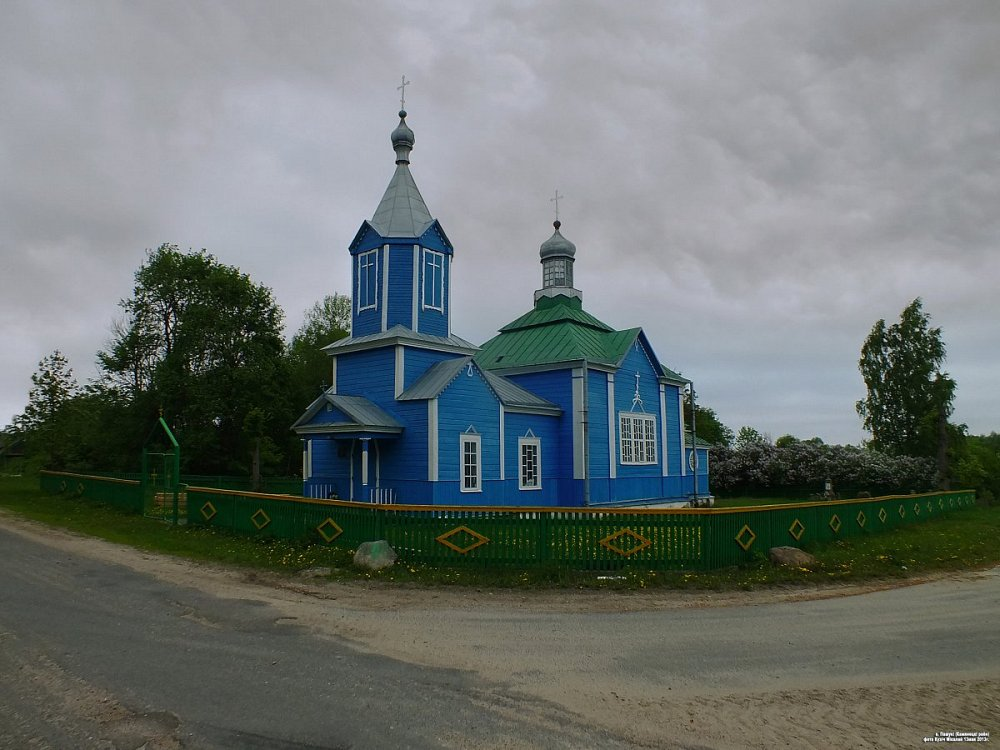 Пашукі. Свята-Андрэеўская царква